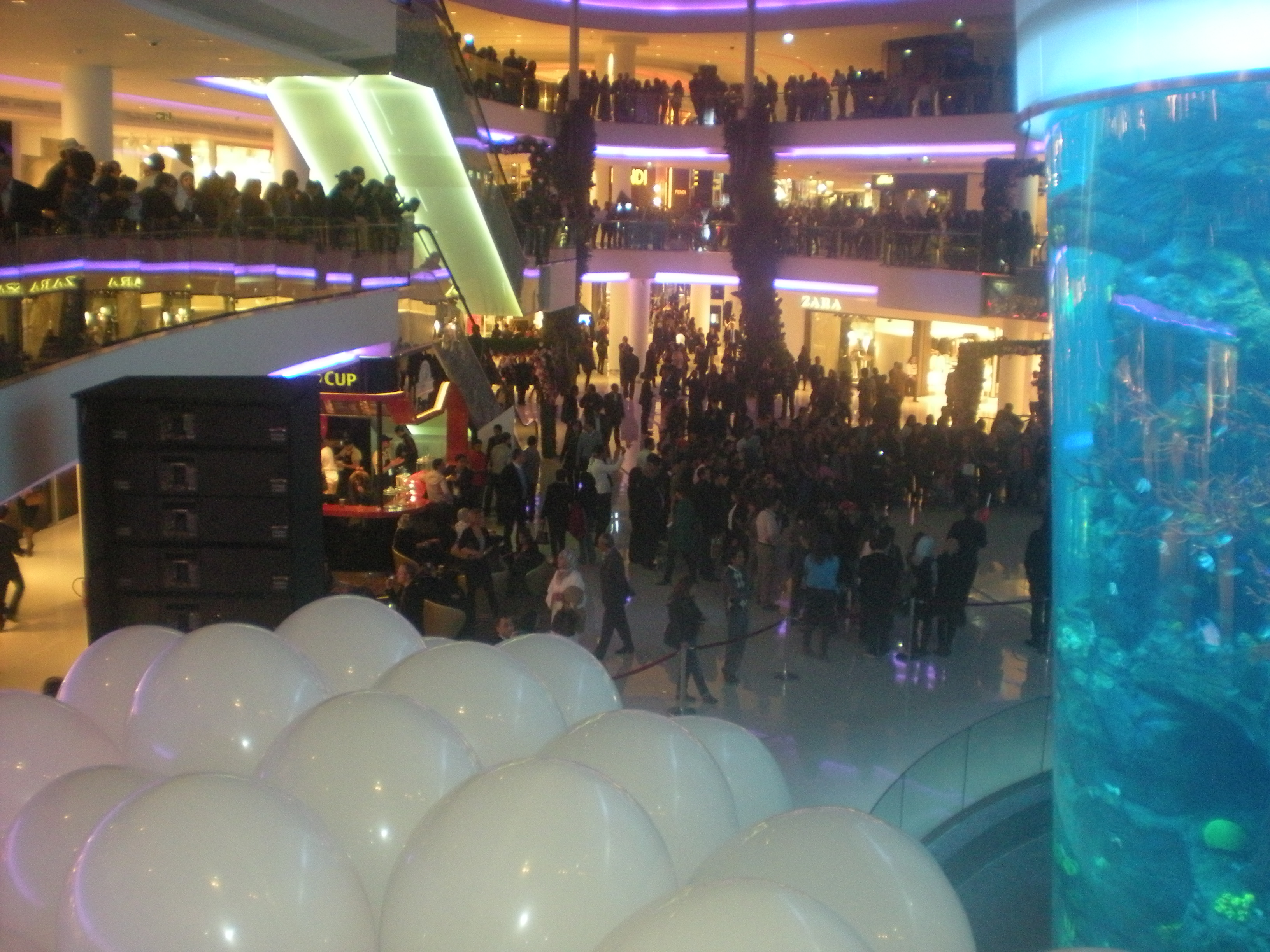 Africa's largest shopping complex opened in Casablanca on December 1st. المجمع التجاري الأكبر في إفريقيا فتح أبوابه للمتسوقين في الدار البيضاء في الأول من ديسمبر. Le plus grand centre commercial d'Afrique a été inauguré à Casablanca le 1er décembre.